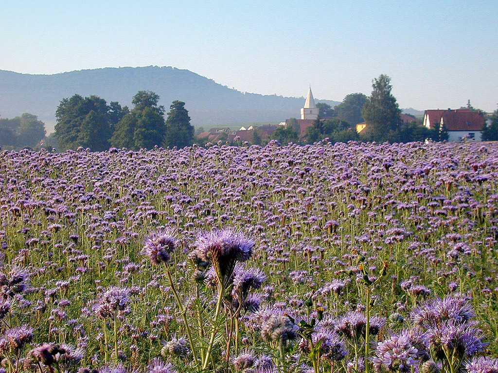 Ritschenhausen/Thüringen, blühende Phacelia